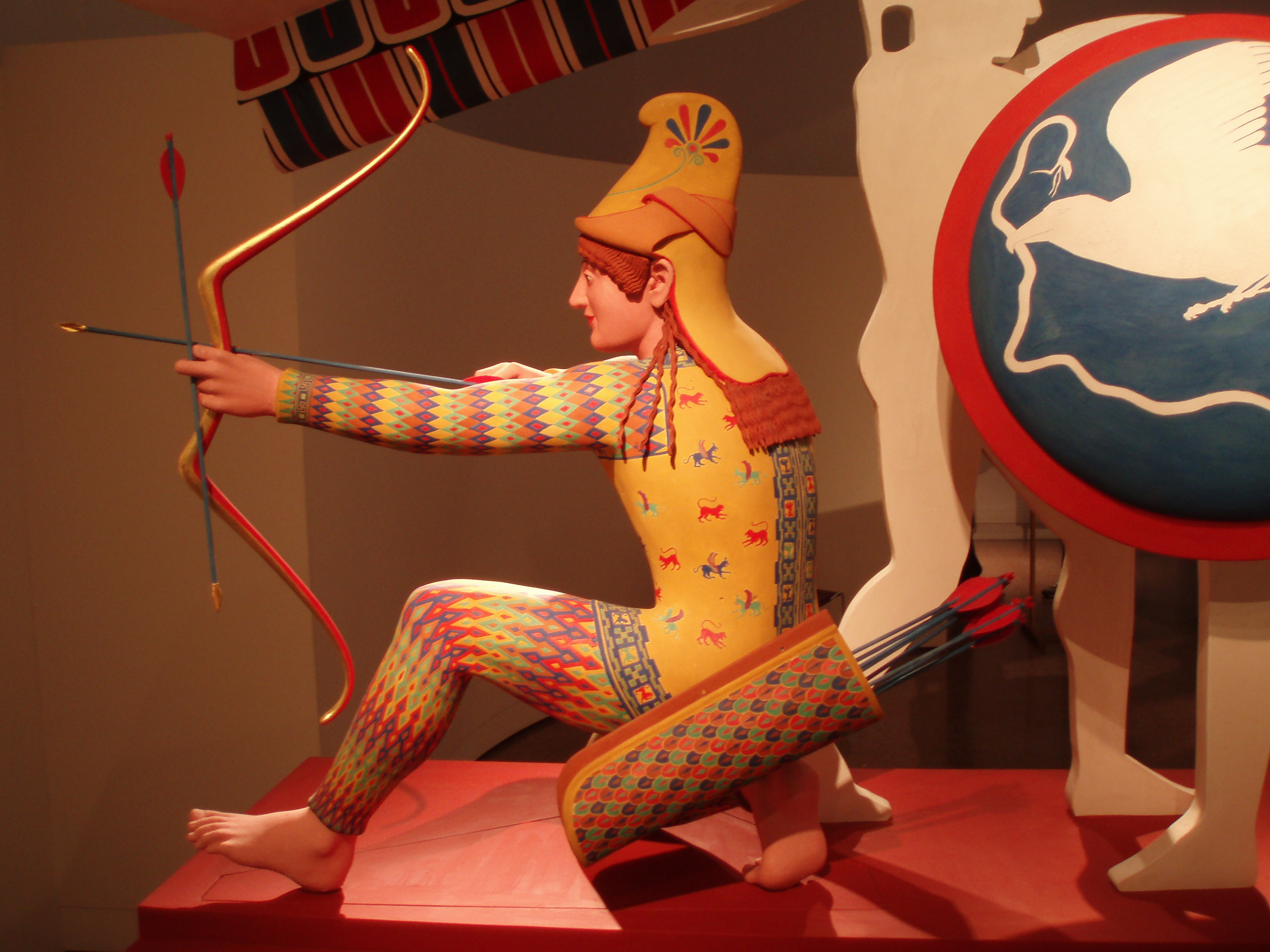 Restitution du décor polychrome d'un archer troyen («Paris») provenant du fronton Ouest temple d'Athéna Aphaia à Égine. Vers 490 av. J.-C. Exposition « Bunte Götter » dans la version montrée à Athènes. Etude : Vinzenze Brinkmann et Hermann Pflug. Peinture : Ulrike Koch-Brinkmann. Arc et flèches : Sylvia Kellner et Ina Kleiß. Boucles de cheveux : Olaf Herzog. Original : Munich, Staatliche Antikensammlungen und Glyptothek.